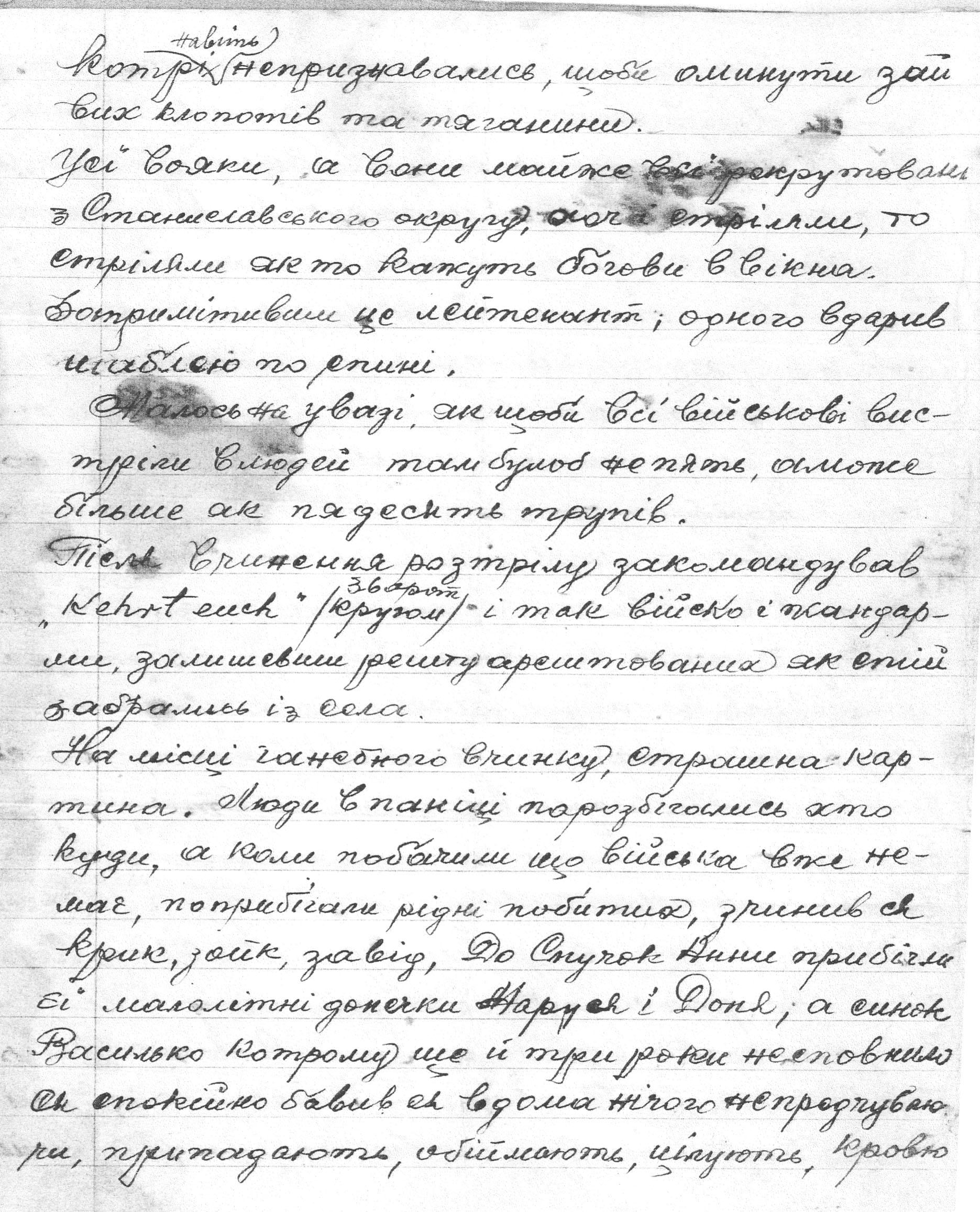 Копія рукопису